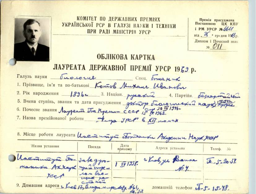 Картка Котова